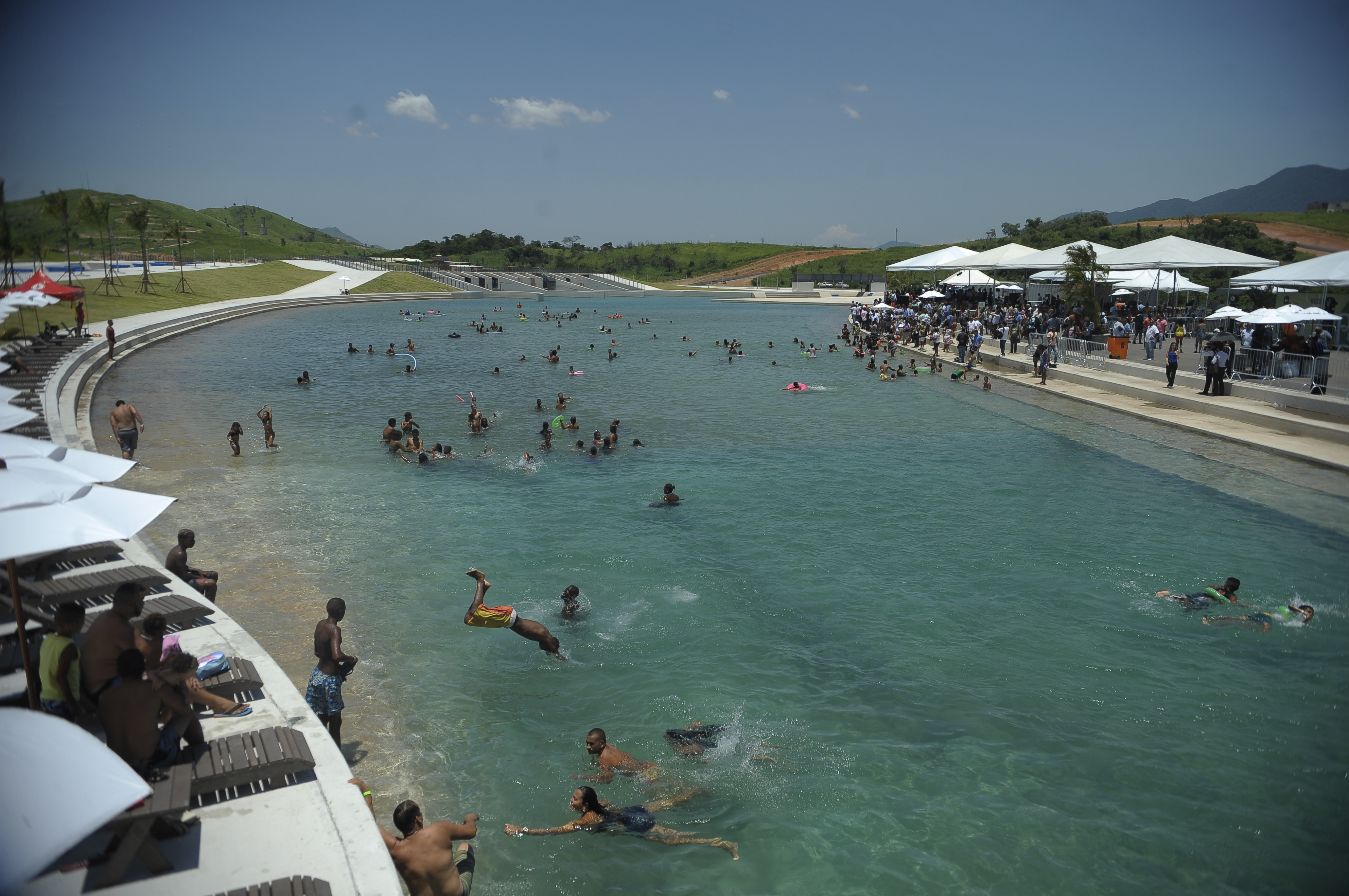 Rio de Janeiro - Parque Radical, construído em Deodoro, na Zona Oeste do Rio, para as Olimpíadas do Rio 2016 é aberto ao público para o verão (Tomaz Silva/Agência Brasil)